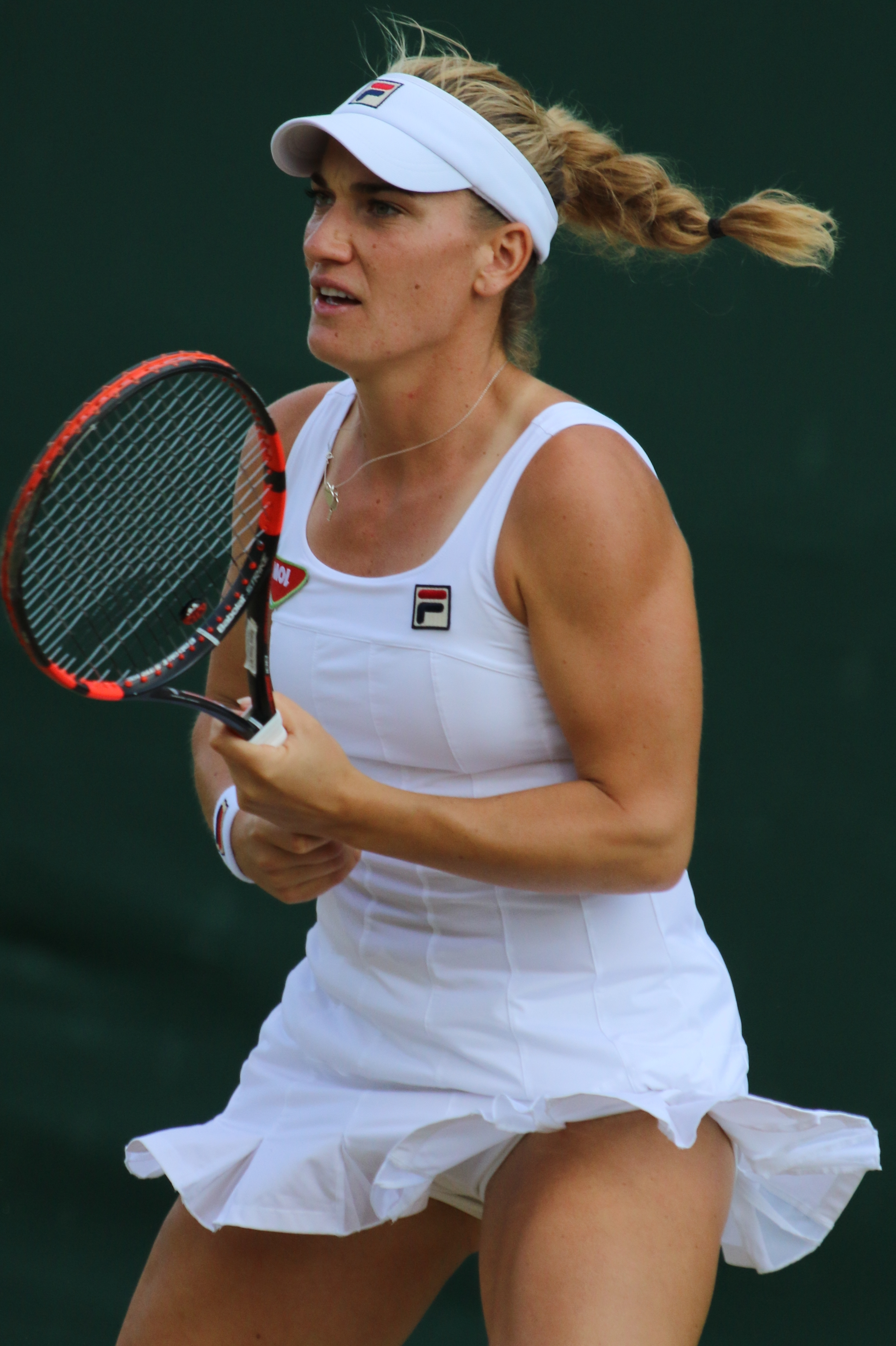 Babos WM17 (8)